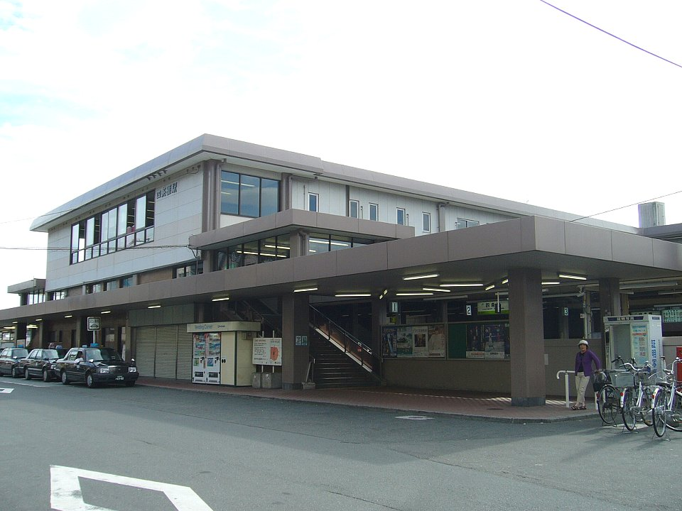 四条畷駅 駅舎 2006年8月 Bakkai撮影